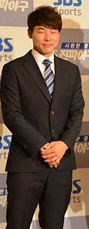 SBS스포츠 2015 프로야구 KBO리그 기자간담회